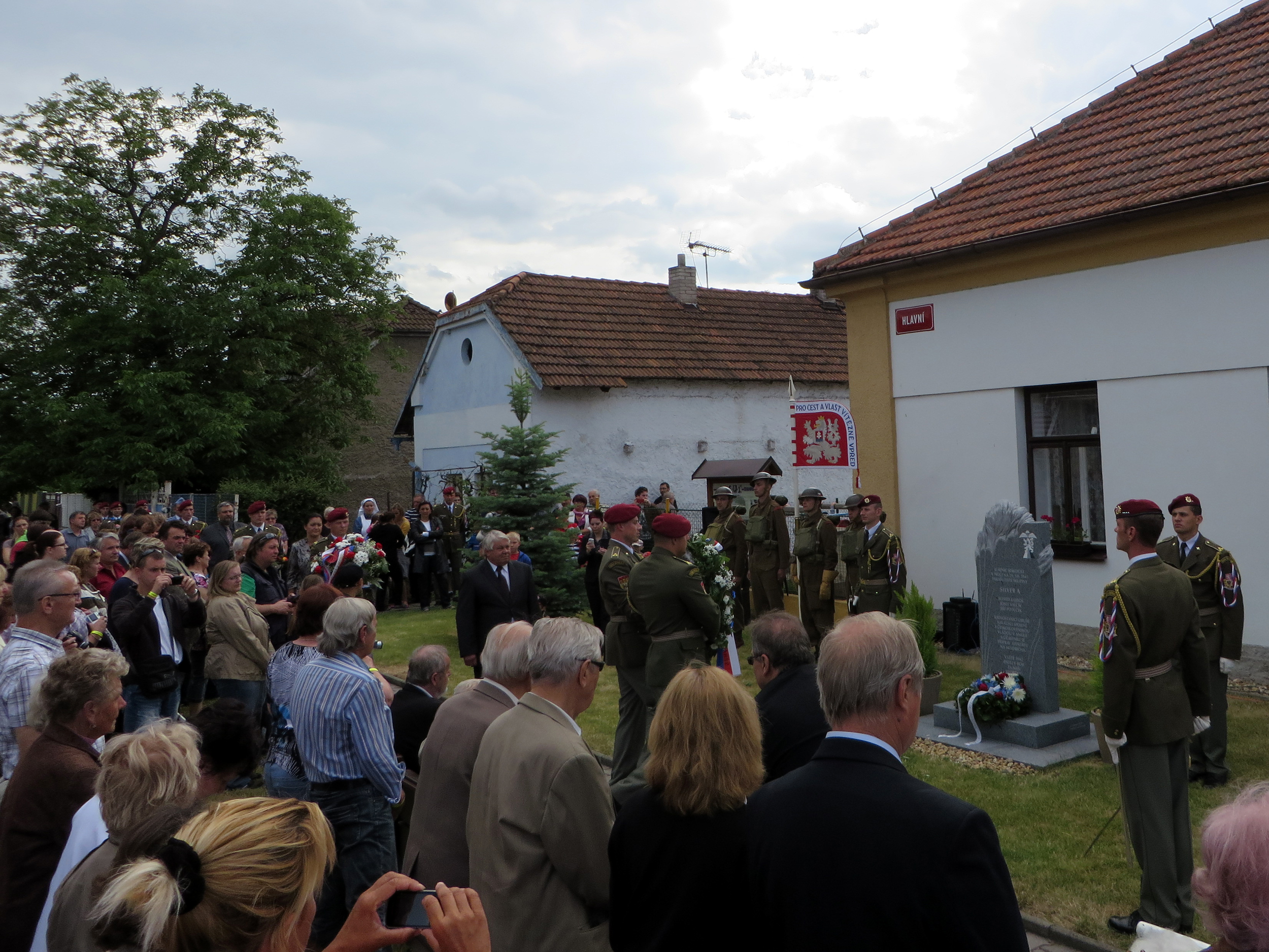 Senice. Pietní akt k uctení památky skupiny Silver A.